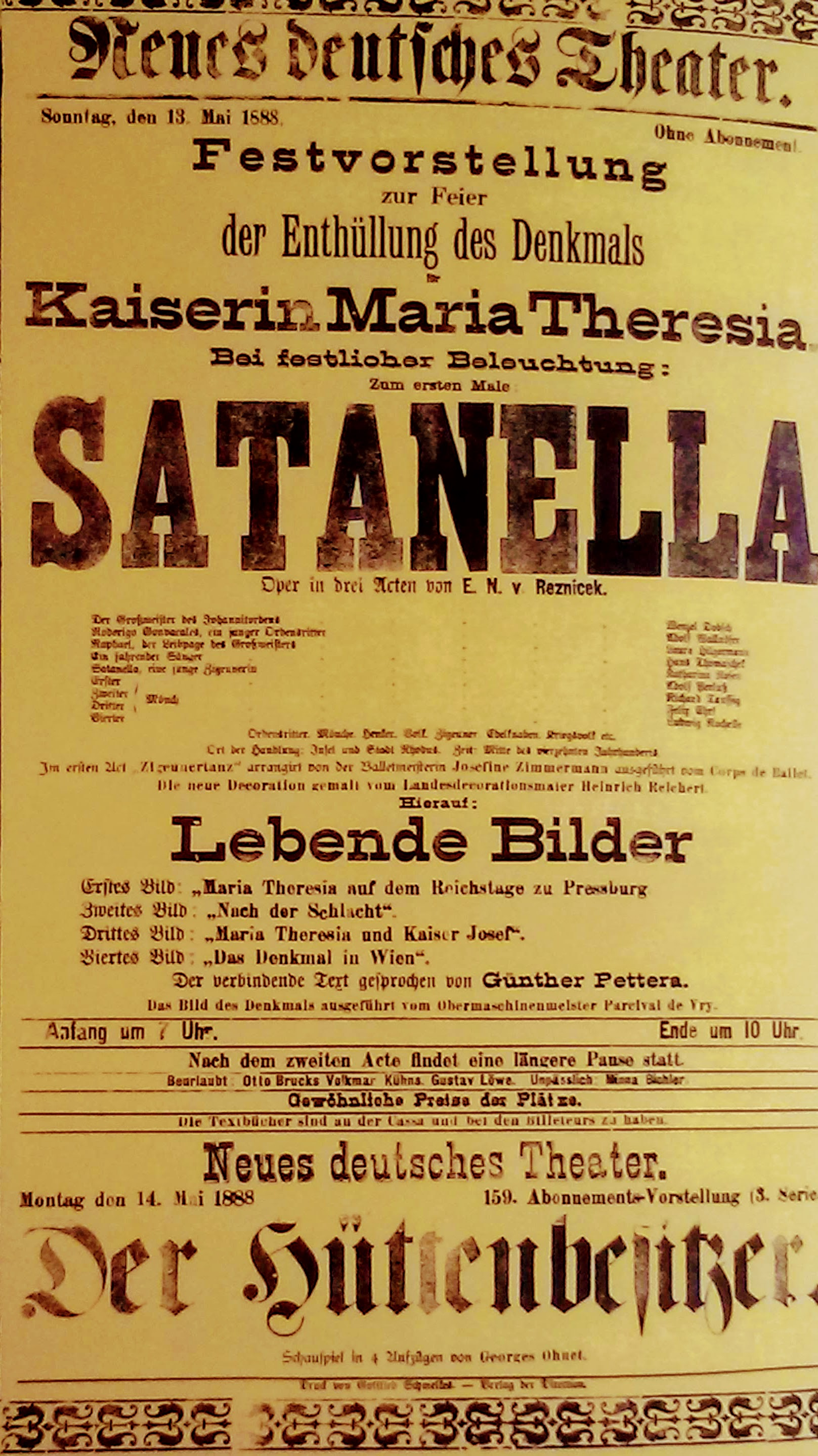 Satanella, premiéra 13. 5. 1888